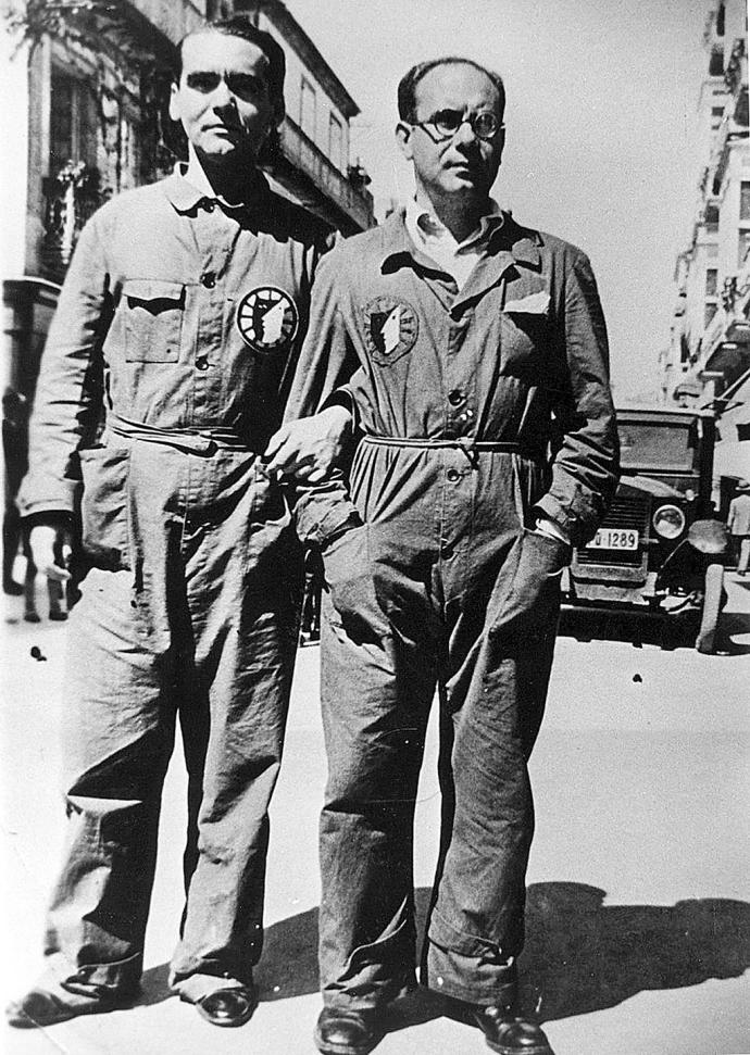 Federico García Lorca y Eduardo Ugarte creadores de La Barraca, con el uniforme de la compañía, mono azul con la insignia diseñada por Benjamín Palencia. Vigo, agosto de 1932